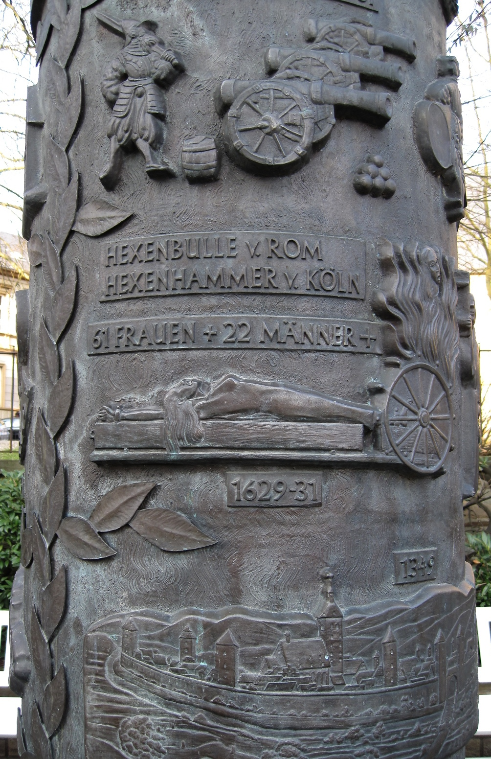 Detail der Geschichtssäule in Menden (Sauerland).